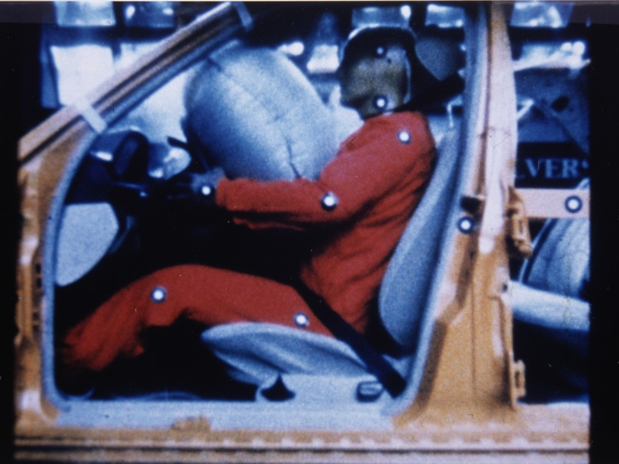 Phasenfoto der Funktionsweise von Lenkrad-Airbag und Gurtstraffer, 1981